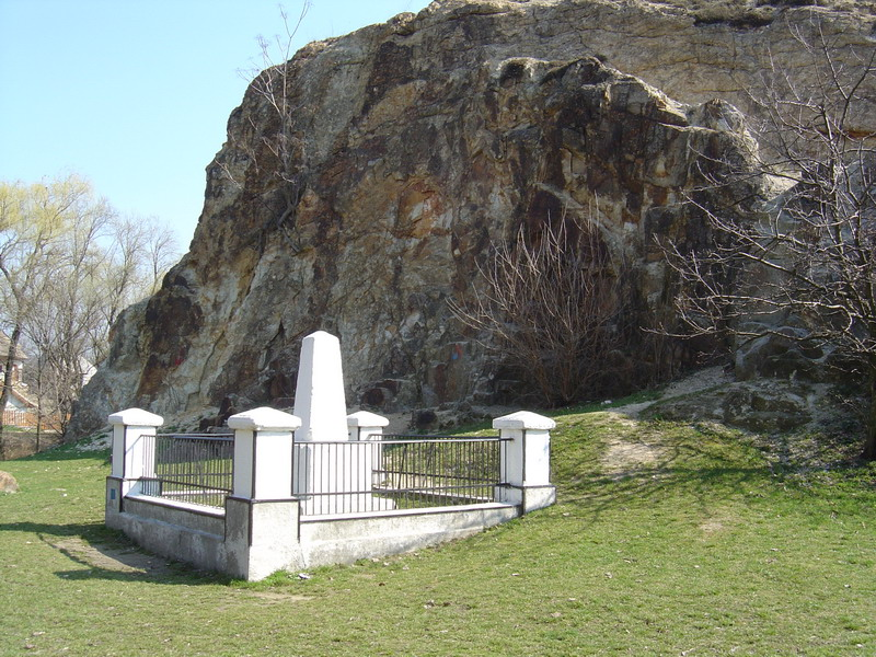 Nadapi ősjegy Magyarország szintezési alappontja Nadap község mellett